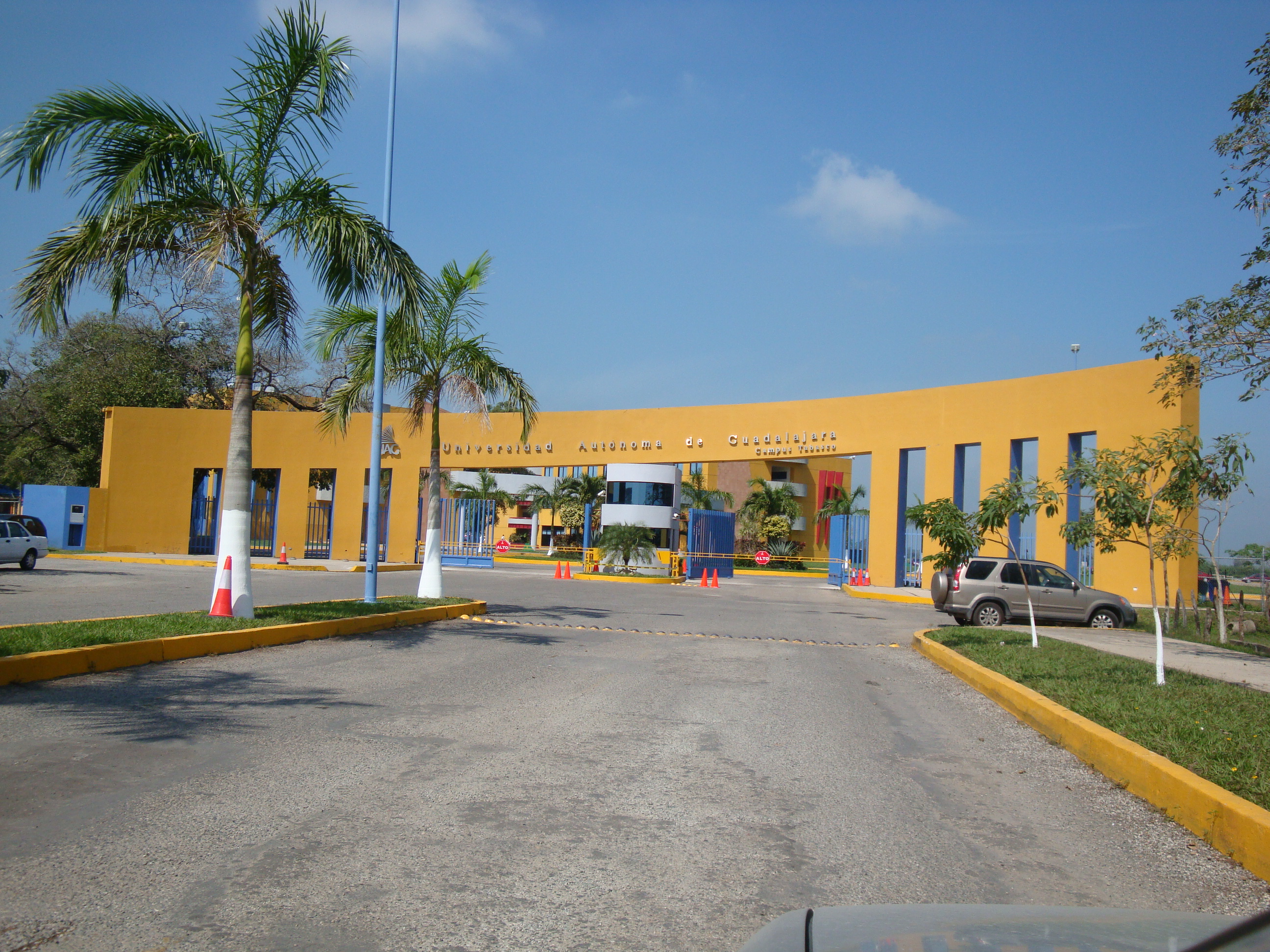 Entrada principal de la Universidad Autónoma de Guadalajara "Campus Tabasco", en la ciudad de Villahermosa, estado de Tabasco, México.